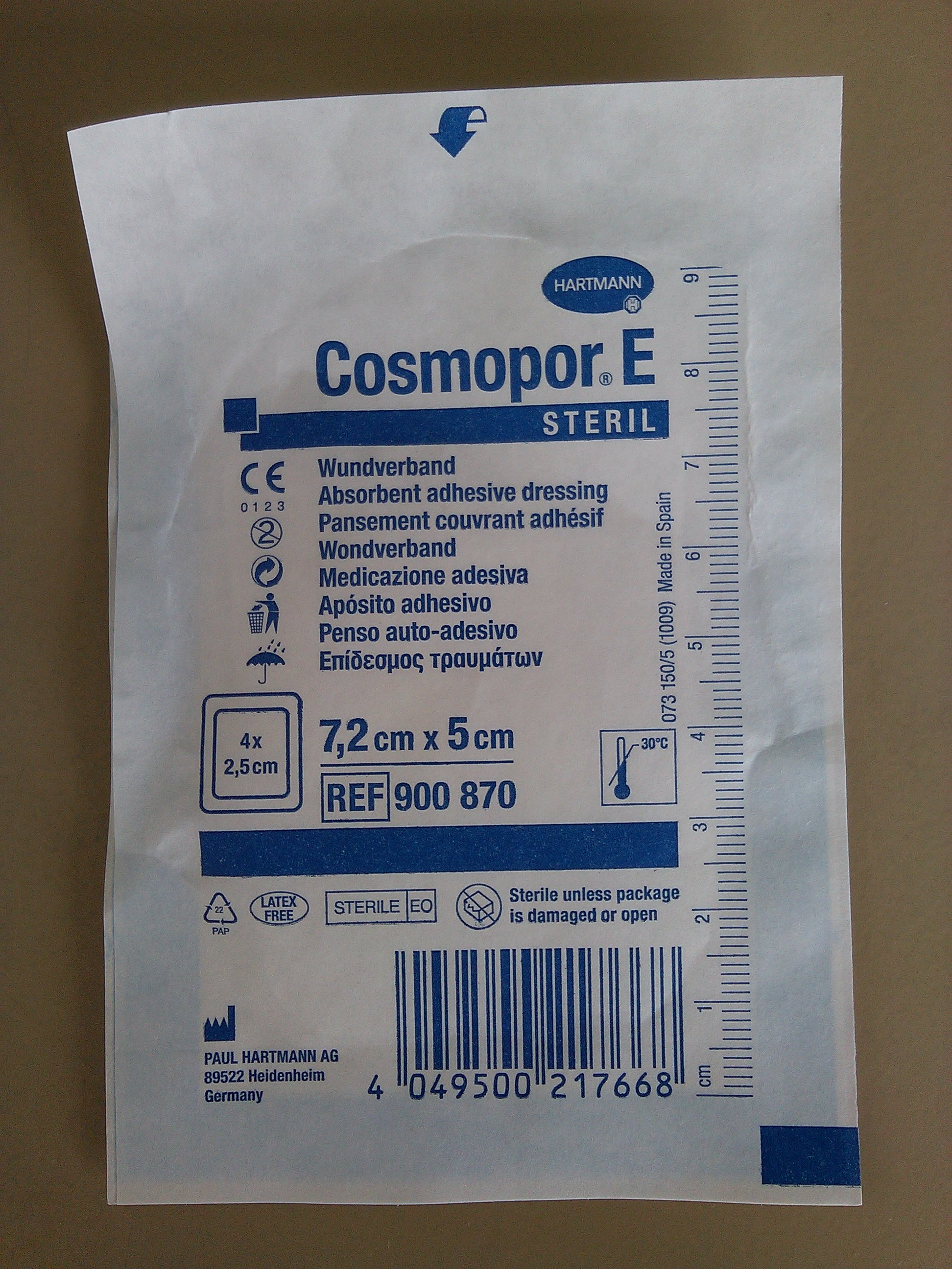 Bildinhalt: Heftpflaster Cosmopor E der Firma Hartmann, ungeöffnete Verpackung Aufnahmeort: Mannheim, Deutschland